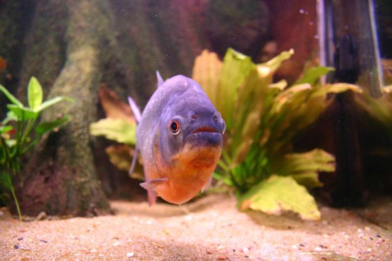 Voksen rød piratfisk - Pygocentrus Nattereri